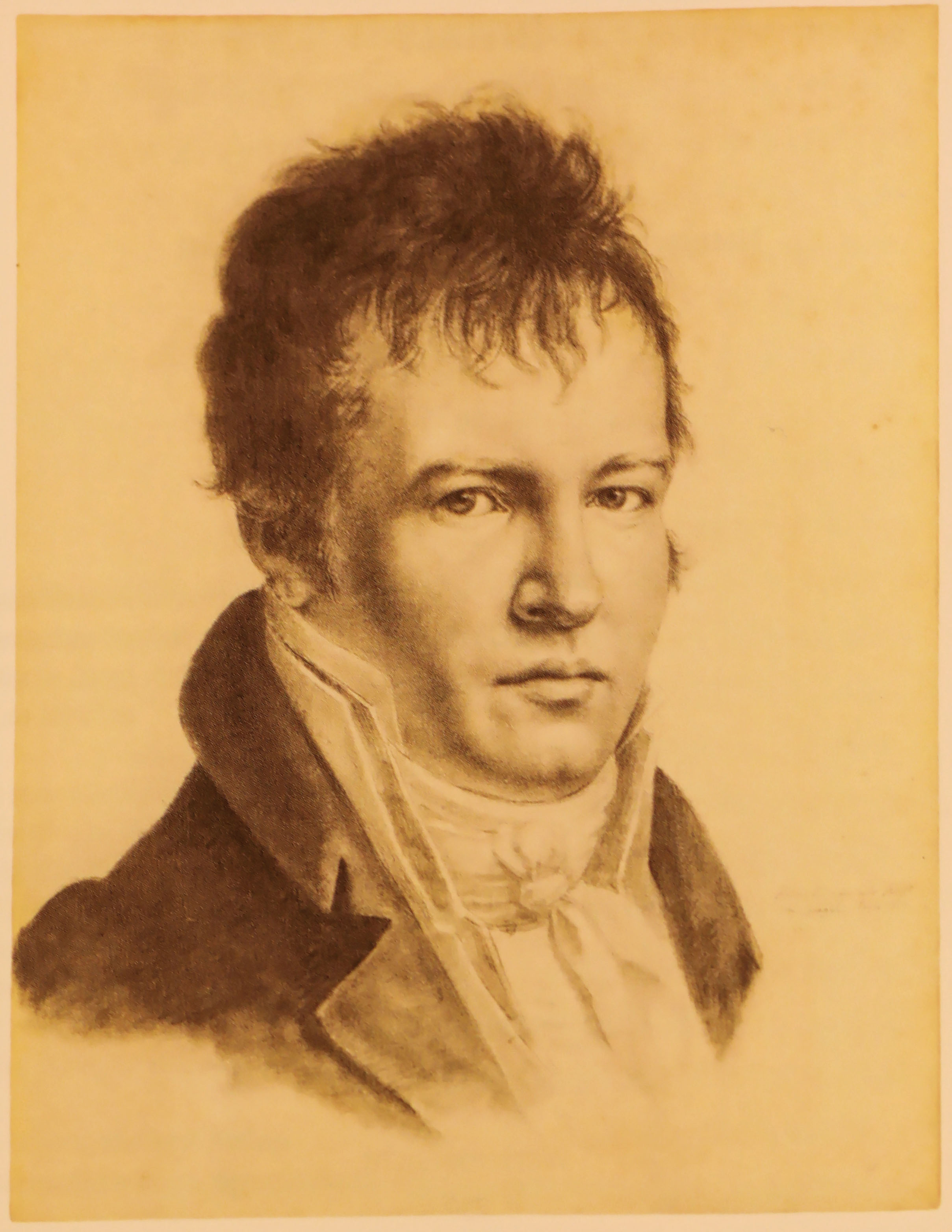 Humboldt in jungen Jahren